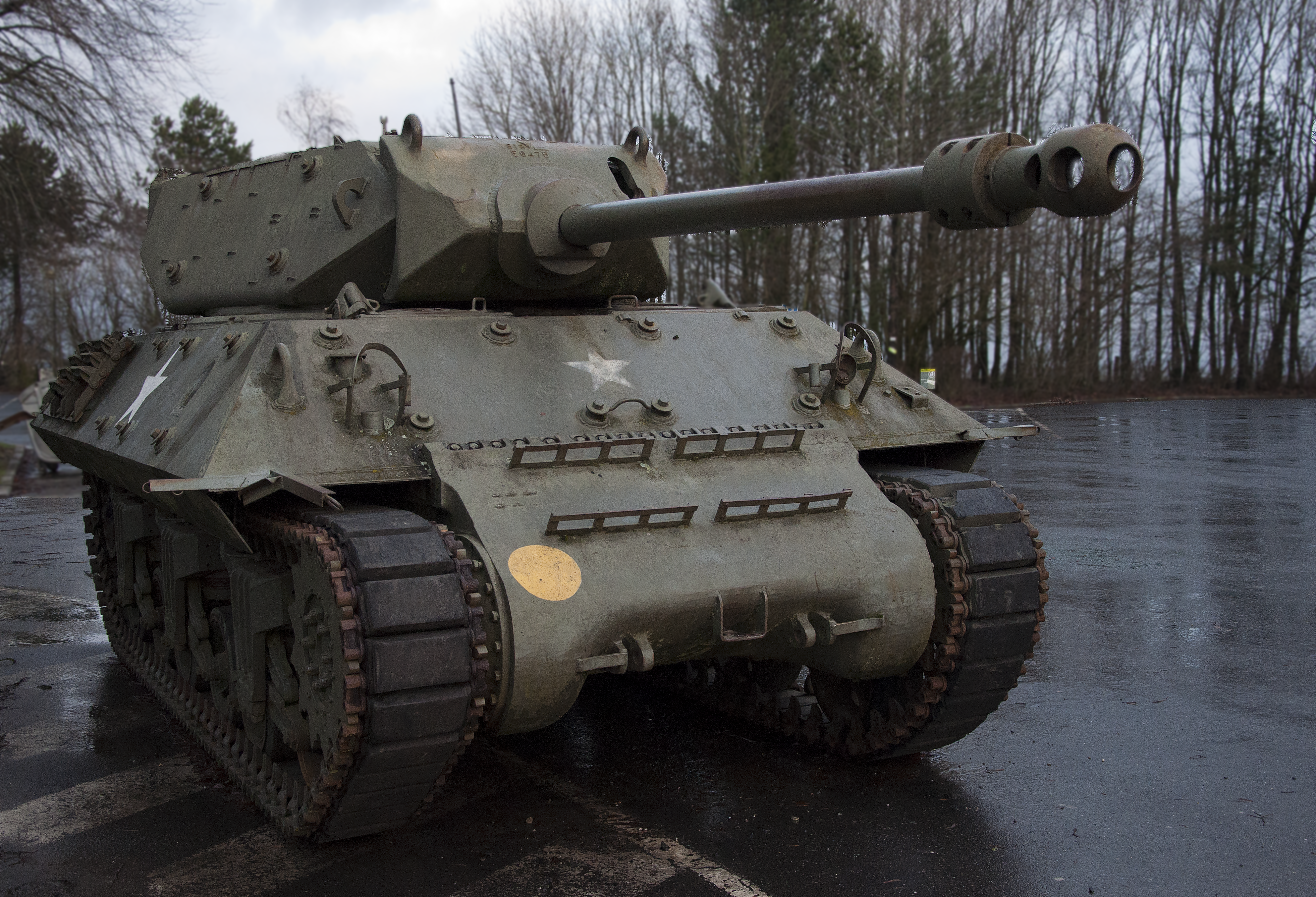 M10 Wolverine "Achilles" te Bastogne, op de heuvel Mardasson